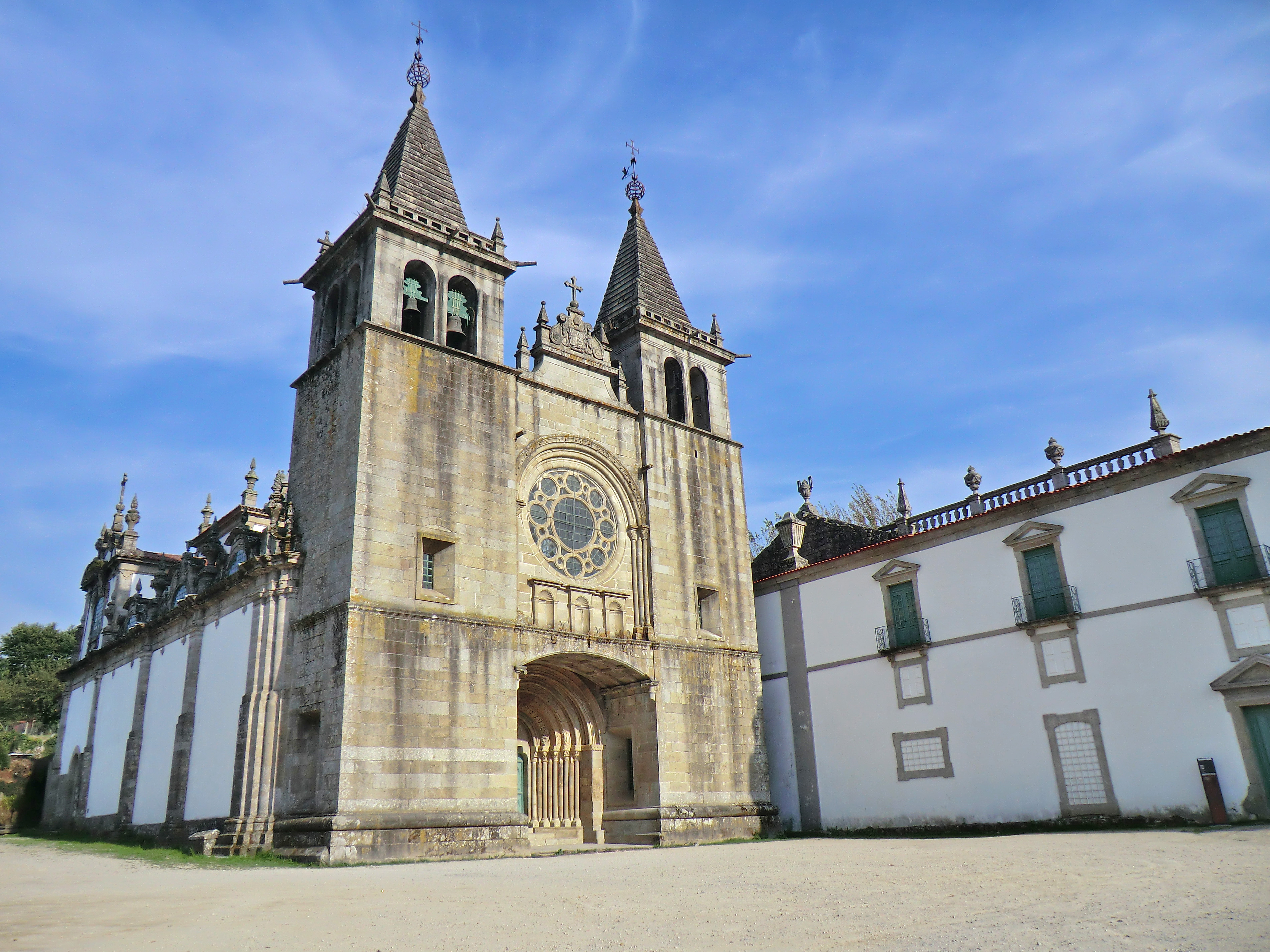 Mosteiro de Pombeiro This file was uploaded for Wiki Loves Monuments in Portugal with the unique identifier 69837.